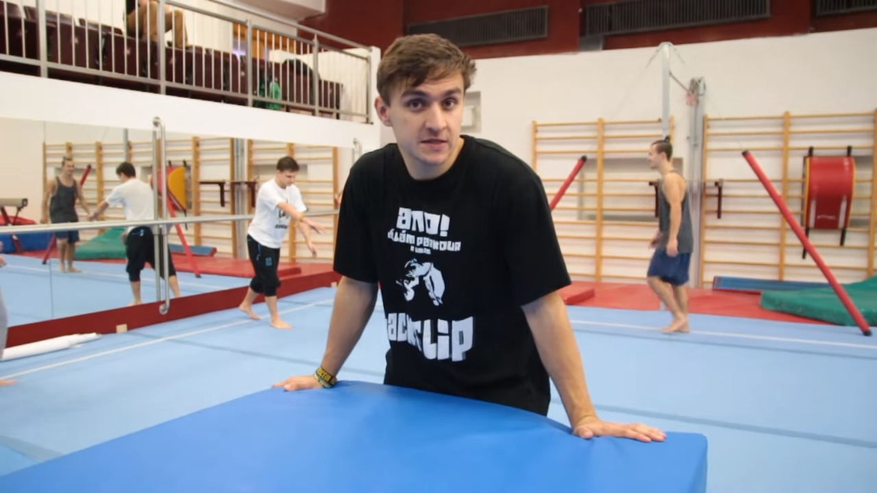 Taras Anatolievich Povoroznyk během parkour tréninku v Českých Budějovicích v roce 2015